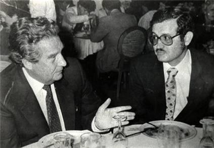 En la cena que se ofreció en Mazatlán a los poetas Octavio Paz y Herminio Martínez